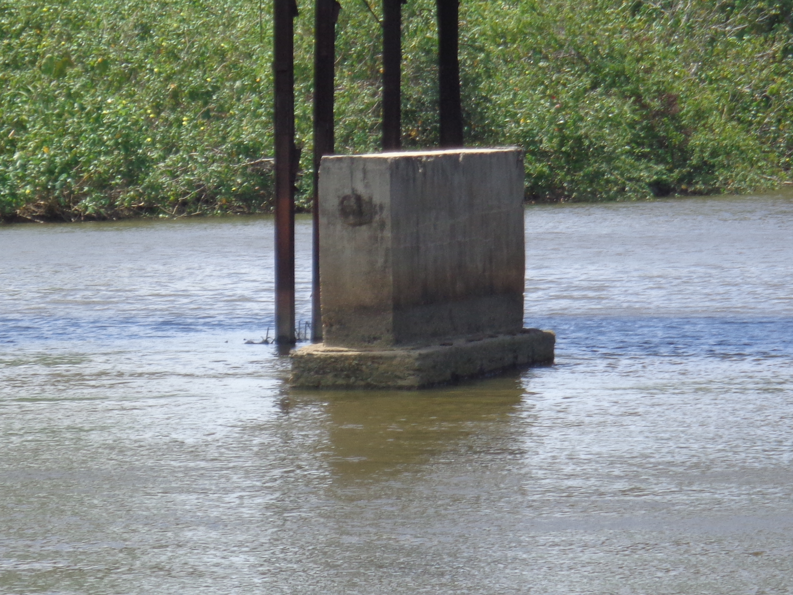 Pilar da antiga ponte de Guriri